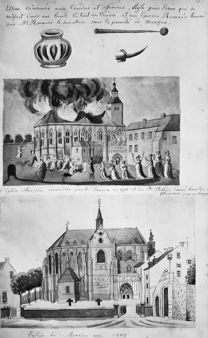 Rooms-Katholieke Kerk: reproductie naar tekening J. van Gulpen